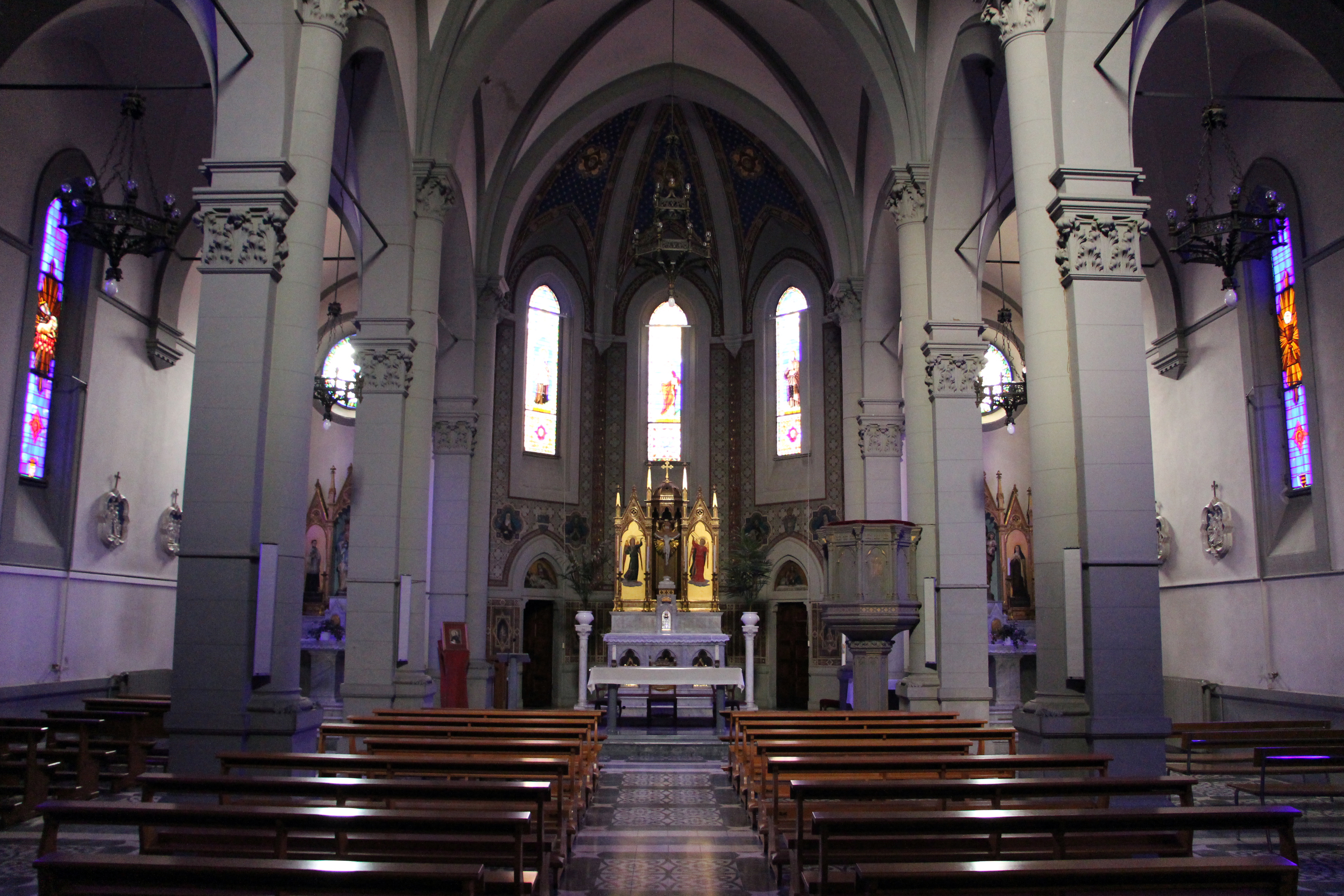 Bernardino poccetti, nozze di cana, 1604, 01.JPG